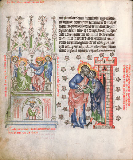 Korunování Panny Marie, Kristus vyvádí Josefa